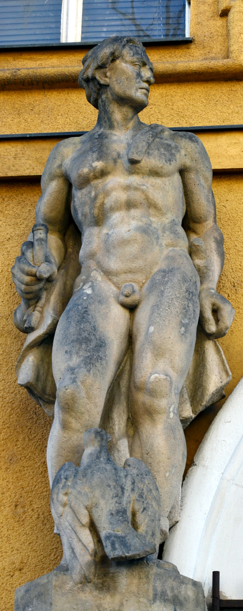 Ladislav Kofránek, Mezinárodní telefonní ústředna, Fibichova, Praha (2. vchod, 3. socha), 1926